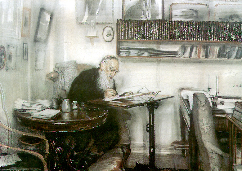 В. Н. Мешков. Л. Н. Толстой в яснополянской библиотеке. Бумага, сангина.